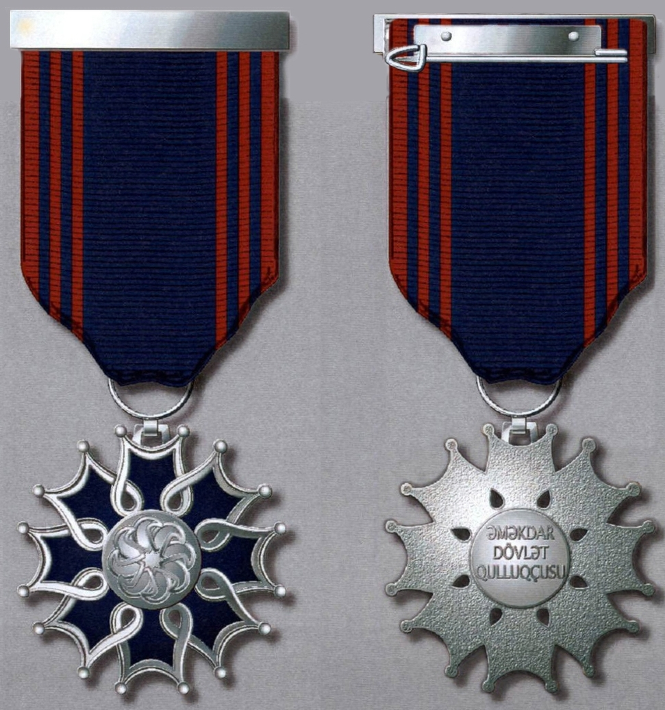 “Əməkdar dövlət qulluqçusu” fəxri adının döş nişanı